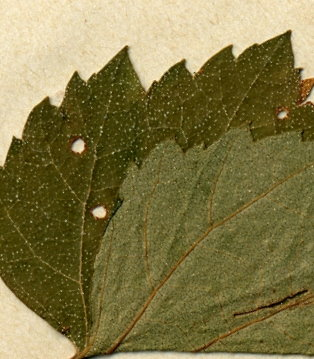 Dieses Bild ist ein Ausschnitt des Herbarbelegs File:Stellwaag 00117a01.jpg der Birkenart Betula verrucosa. Die runden Löcher sind Fraßspuren des Rüsselkäfers Anoplus plantaris.